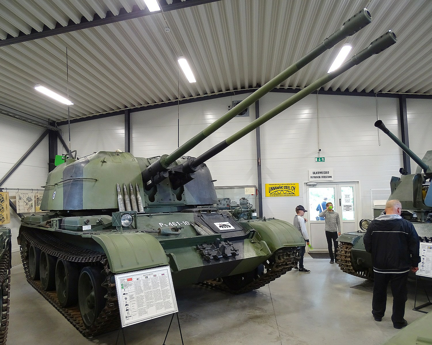 078 - ZSU 23-4